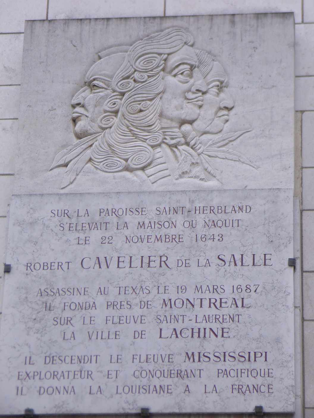 Gedenktafel Robert Cavelier de la Salla am Geburtsort Rouen, Fr